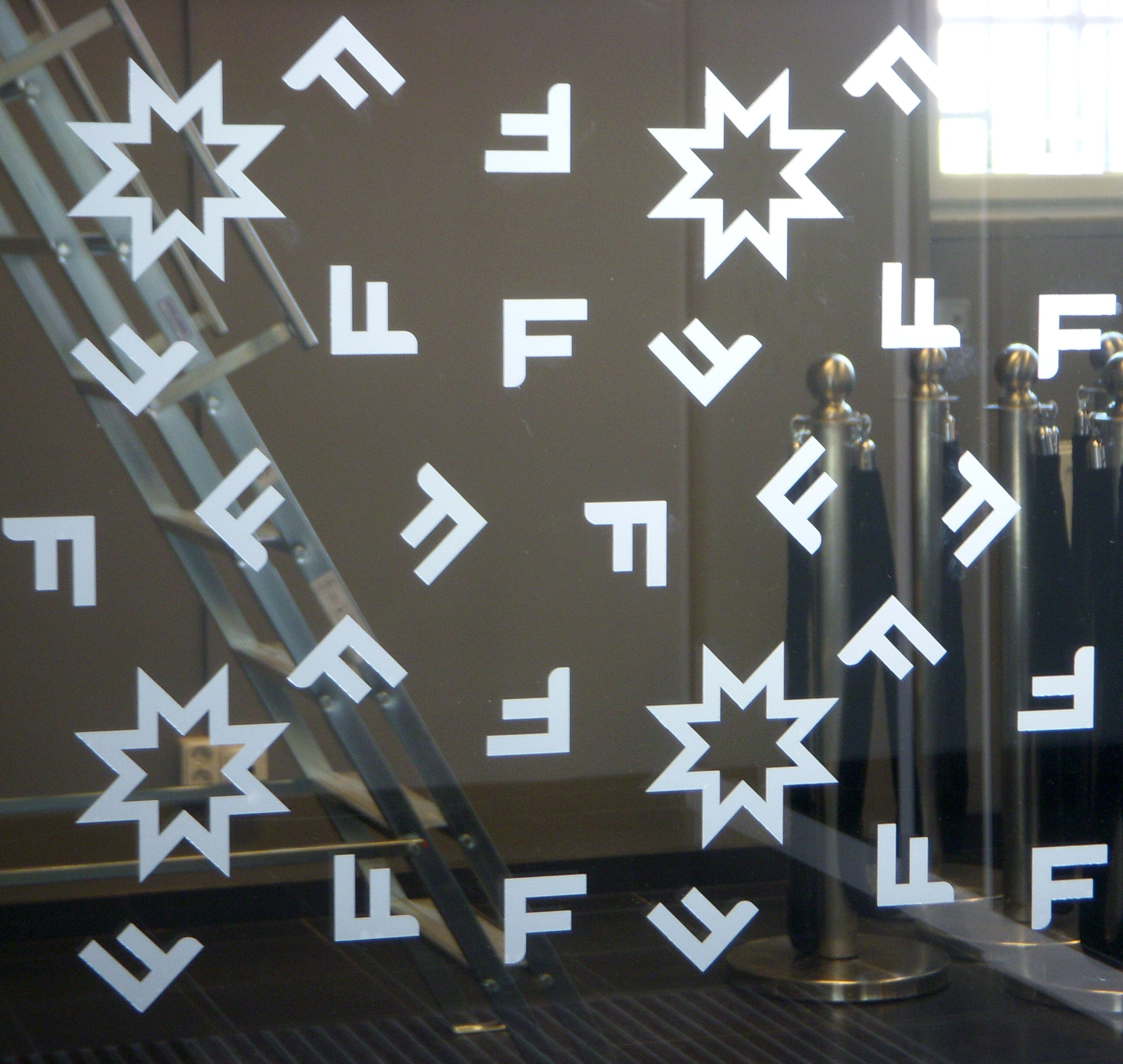 Fotografiska i Stockholm, glasblästring vid entrén